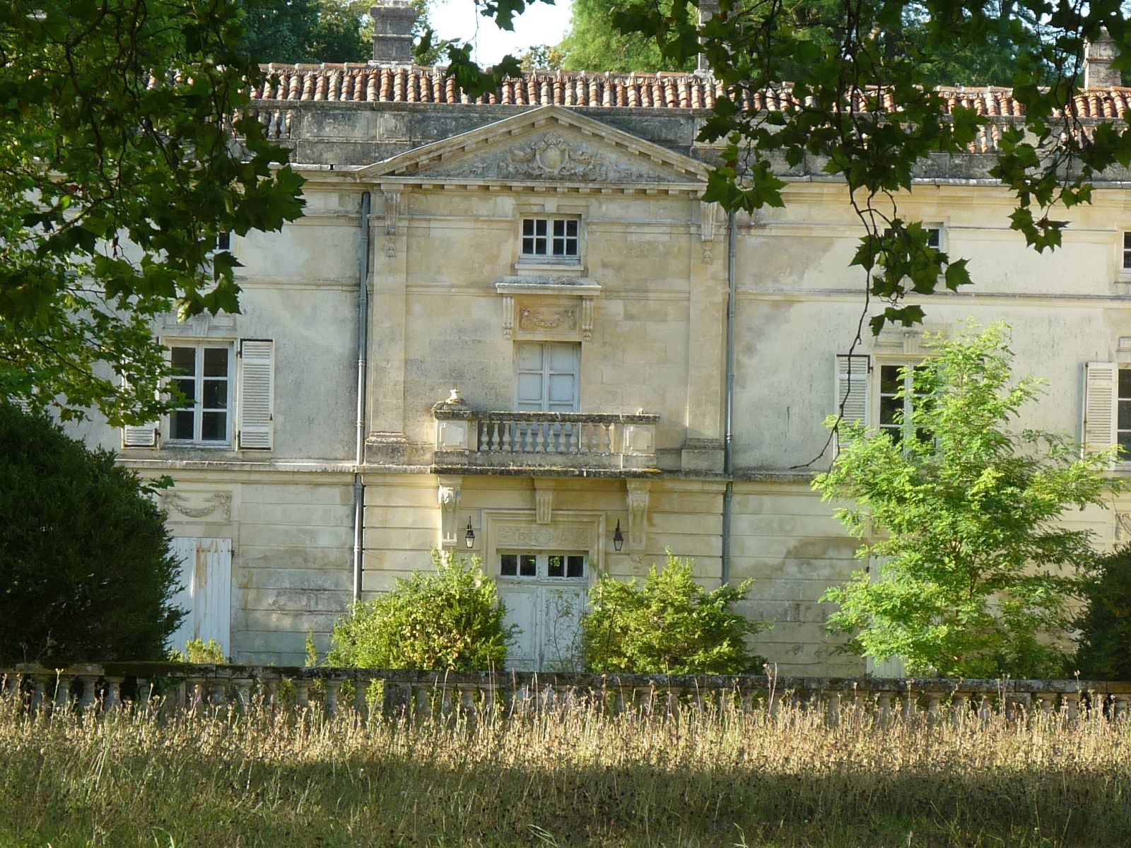 château de la Tenaille (17), France